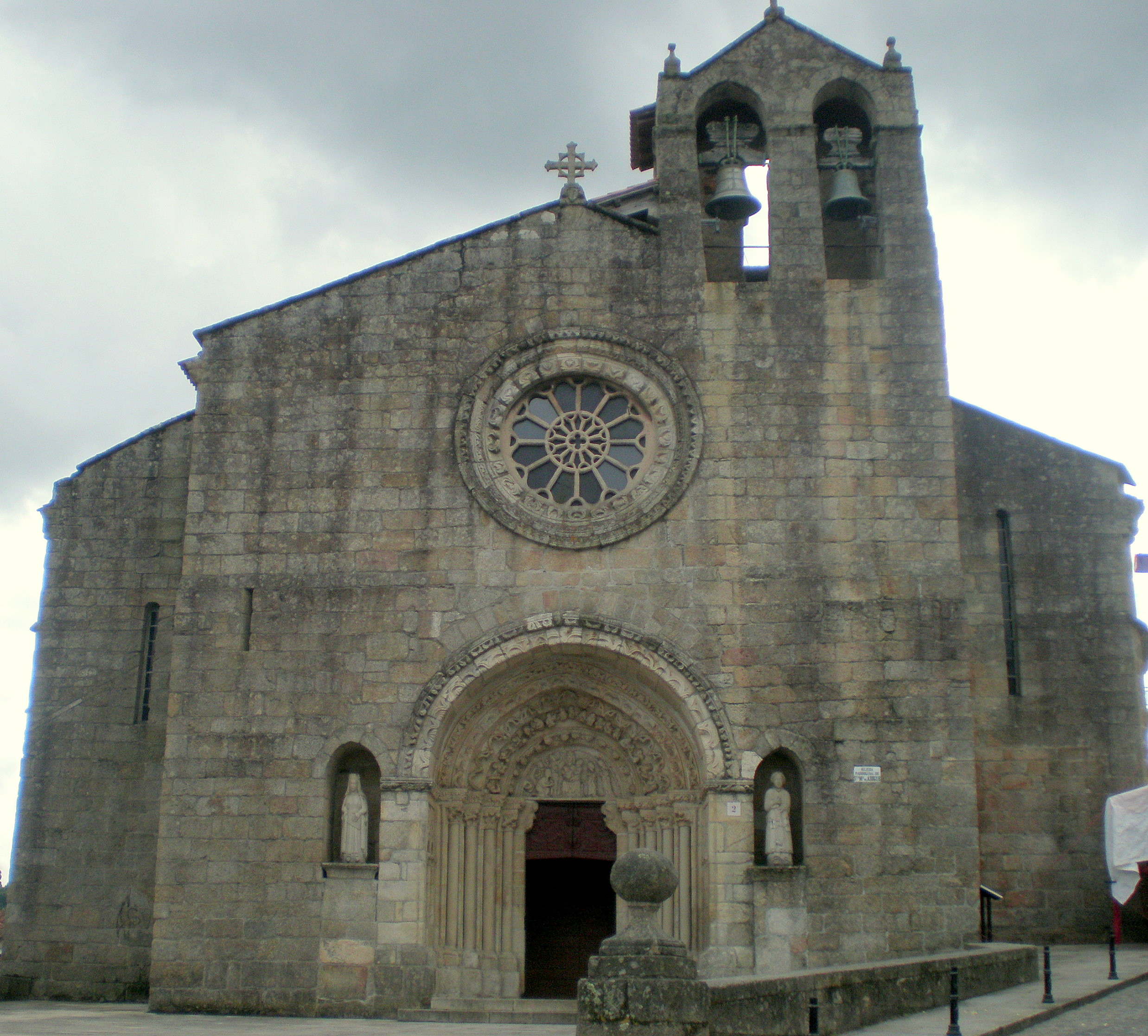 Betanzos, Santa María do Azogue, fachada